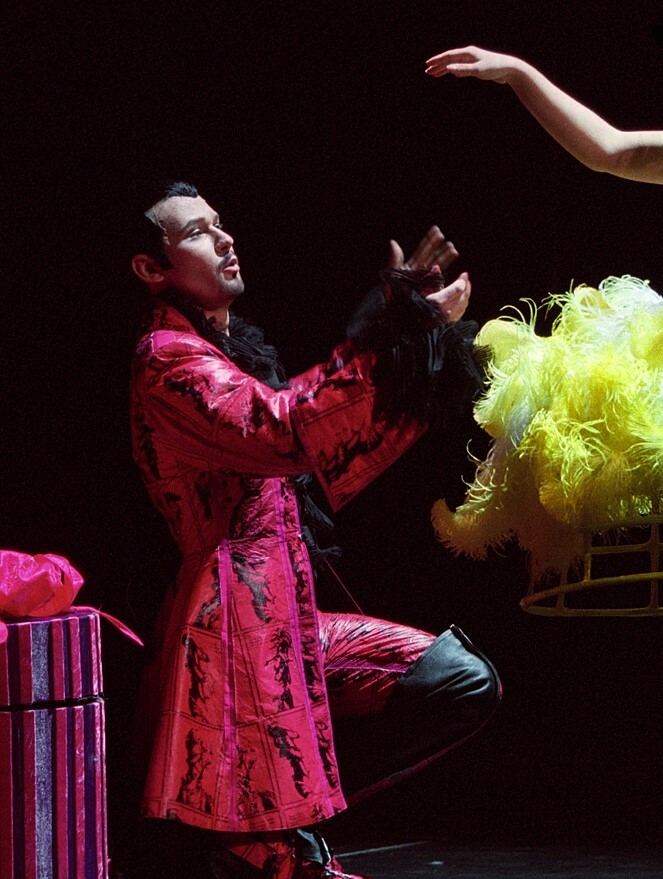 Mariusz Kwiecień, Don Giovanni, Teatr Wielki, Warszawa 2002 (fot. J. Multarzynski)